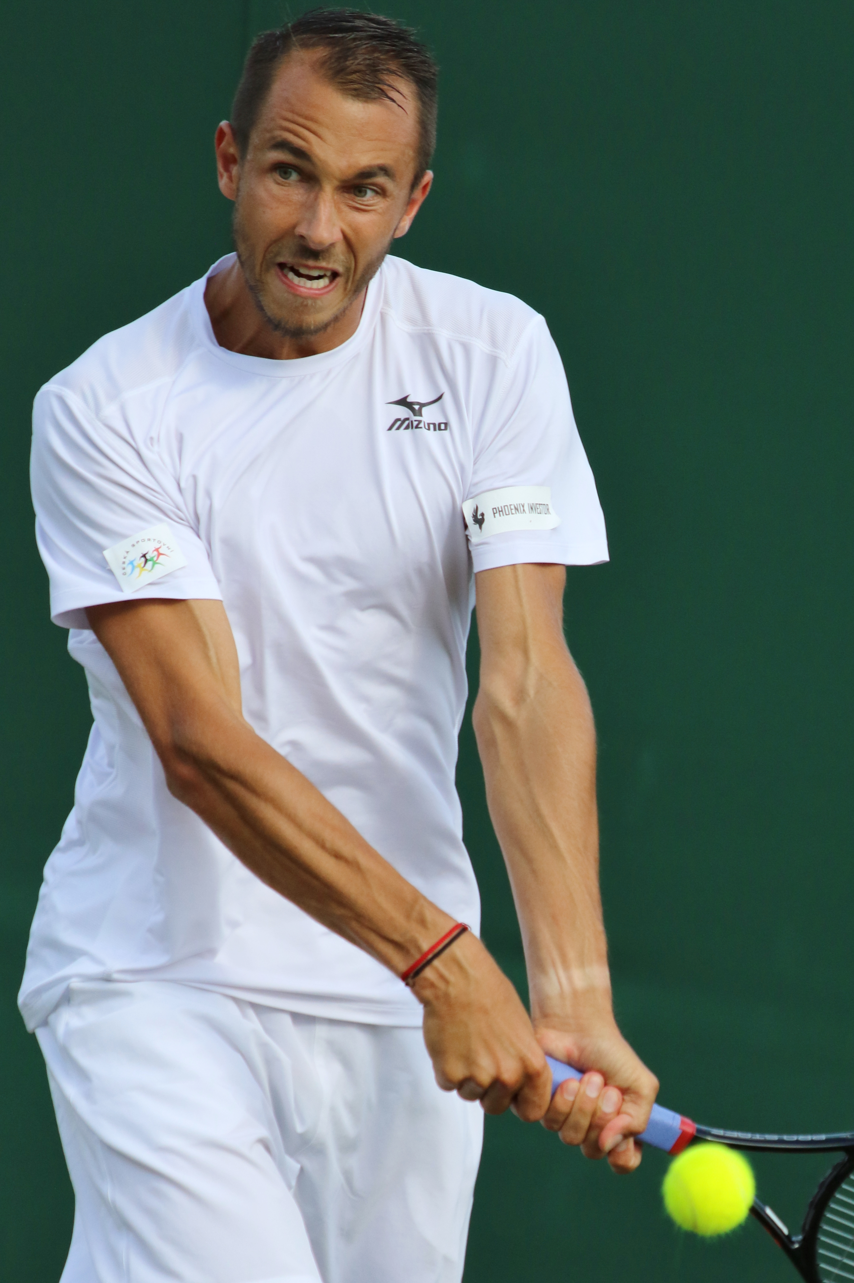 Rosol WM17 (4)